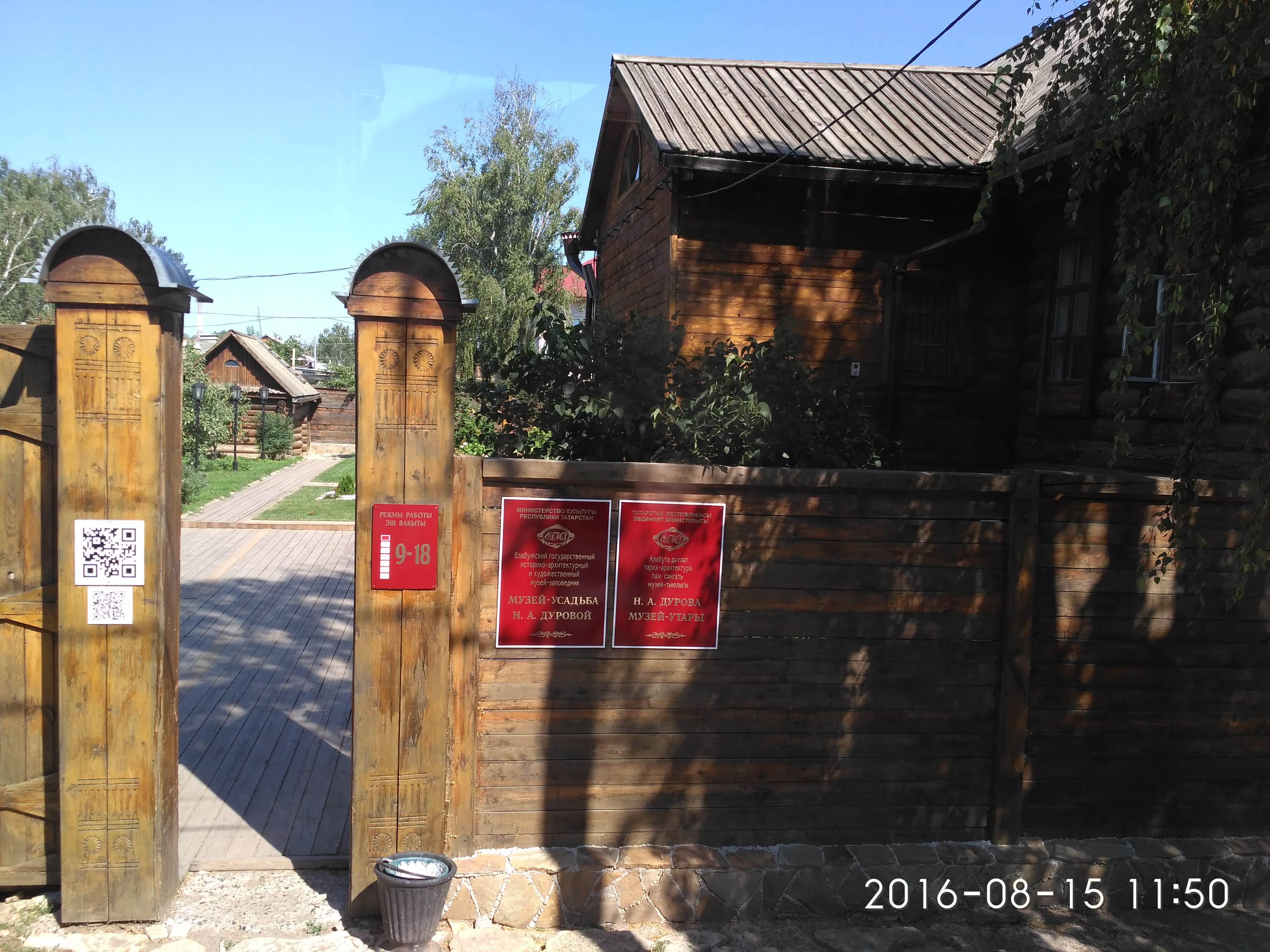 Дом музей Дуровой Н.А.